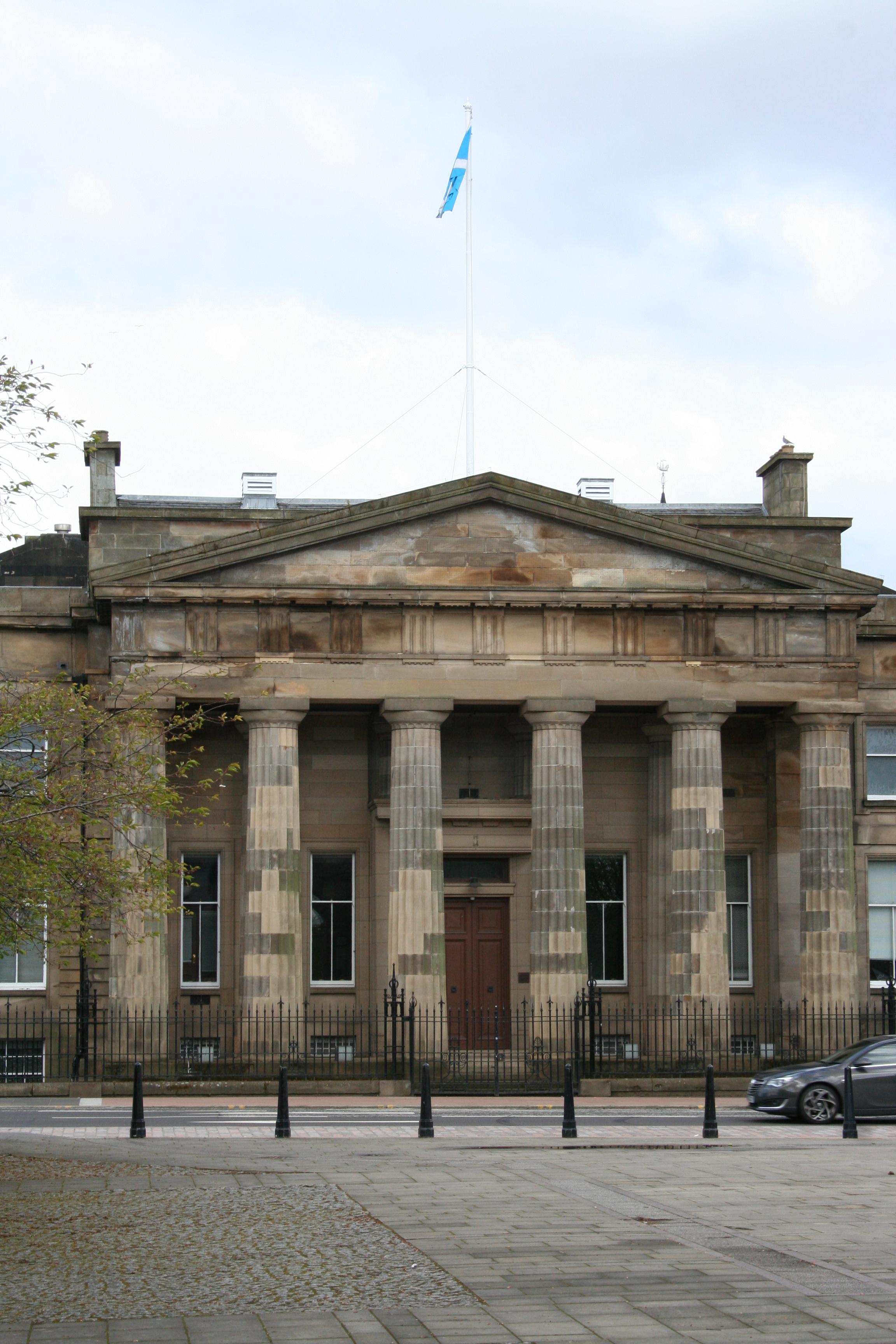 Justizgebäude in Glasgow, Sitz des High Court of Justiciary (212 Saltmarket, Mehr Informationen).